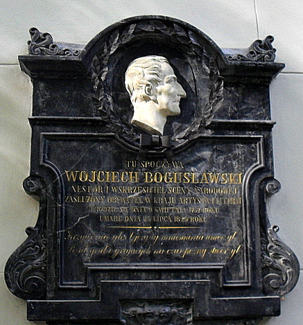 Warszawa, kościół św. Karola Boromeusza, 1792, 1847, 1891-98